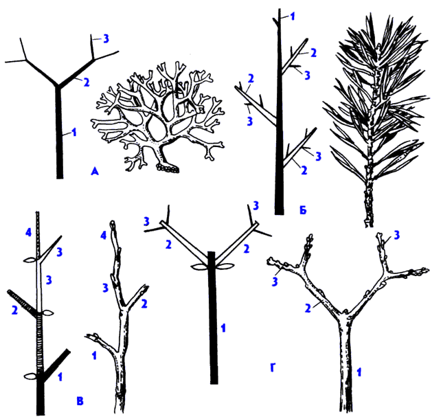 Ветвление побегов. А — дихотомическое у водоросли диктиоты; Б — моноподиальное у сосны; В — симподиальное у черёмухи; Г — ложнодихотомическое у клёна татарского: 1, 2, 3 — оси первого и последующих порядков (из Хржановского)